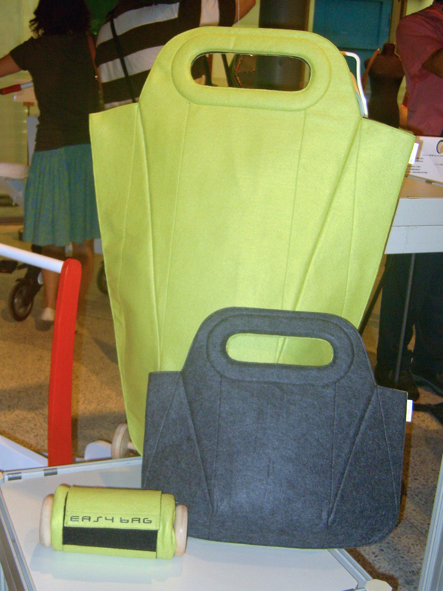 2008 Taiwan Designers' Week: Easy Bag.